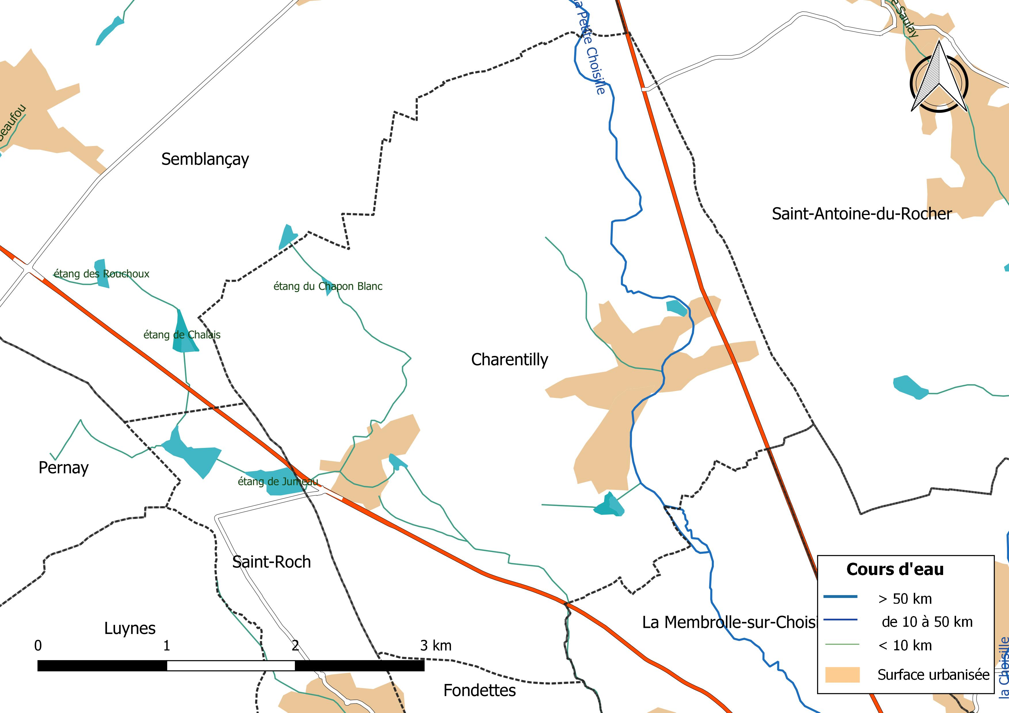 Carte du réseau hydrographique de la commune de Charentilly (France).